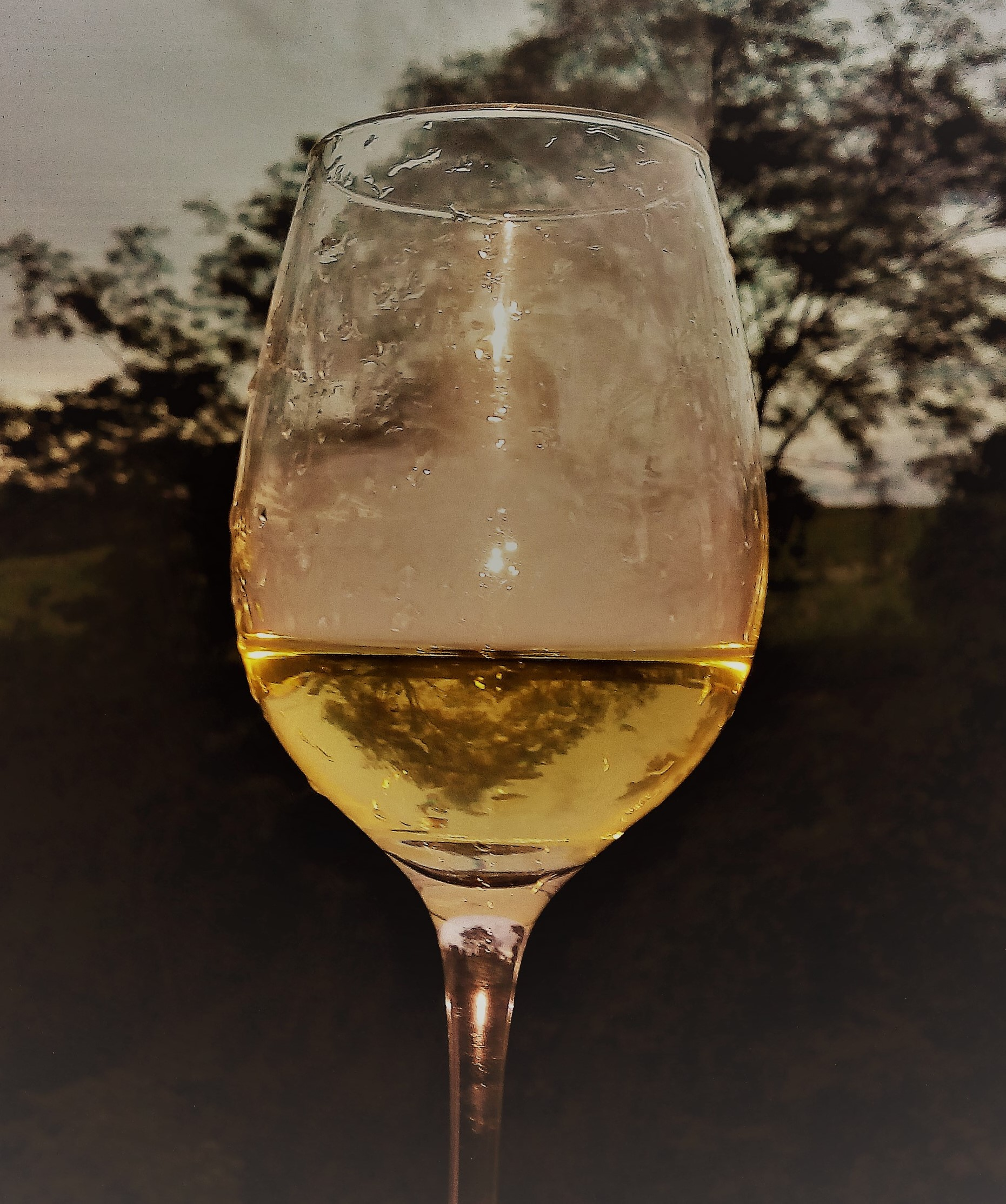 Hidromel Tradicional